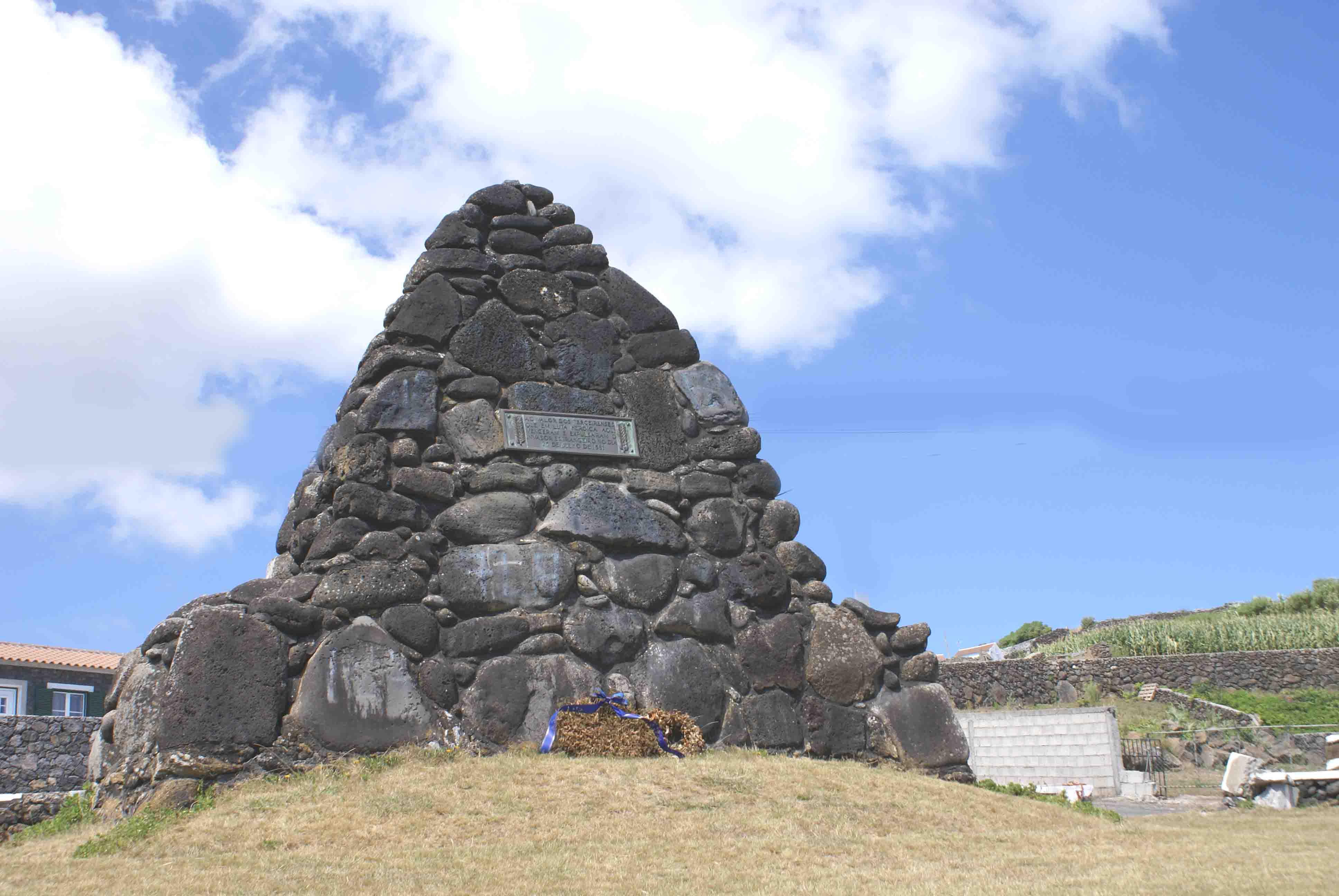 Monumento à batalha da Salga, baía da Salga, Angra do Heroísmo, Açores